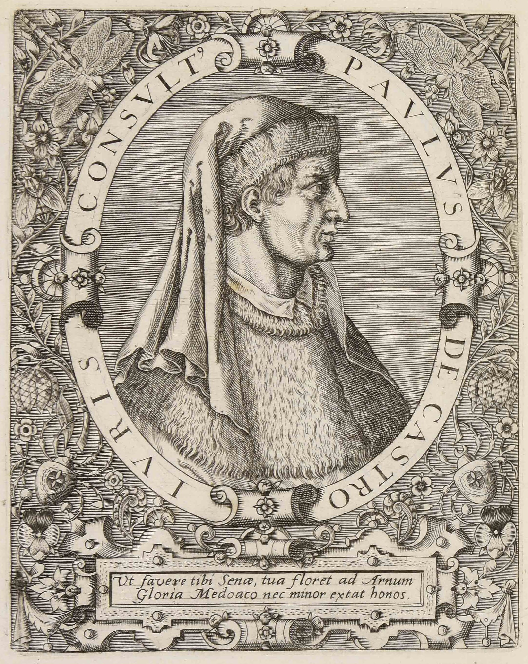 Calcografia in Jean Jacques Boissard, Bibliotheca sive Thesaurus virtutis, Frankfurt am Mein: William Fitzer 1627. Esemplare GI 1 v. c 41 della Biblioteca comunale di Trento, che presenta aggiunte successive.